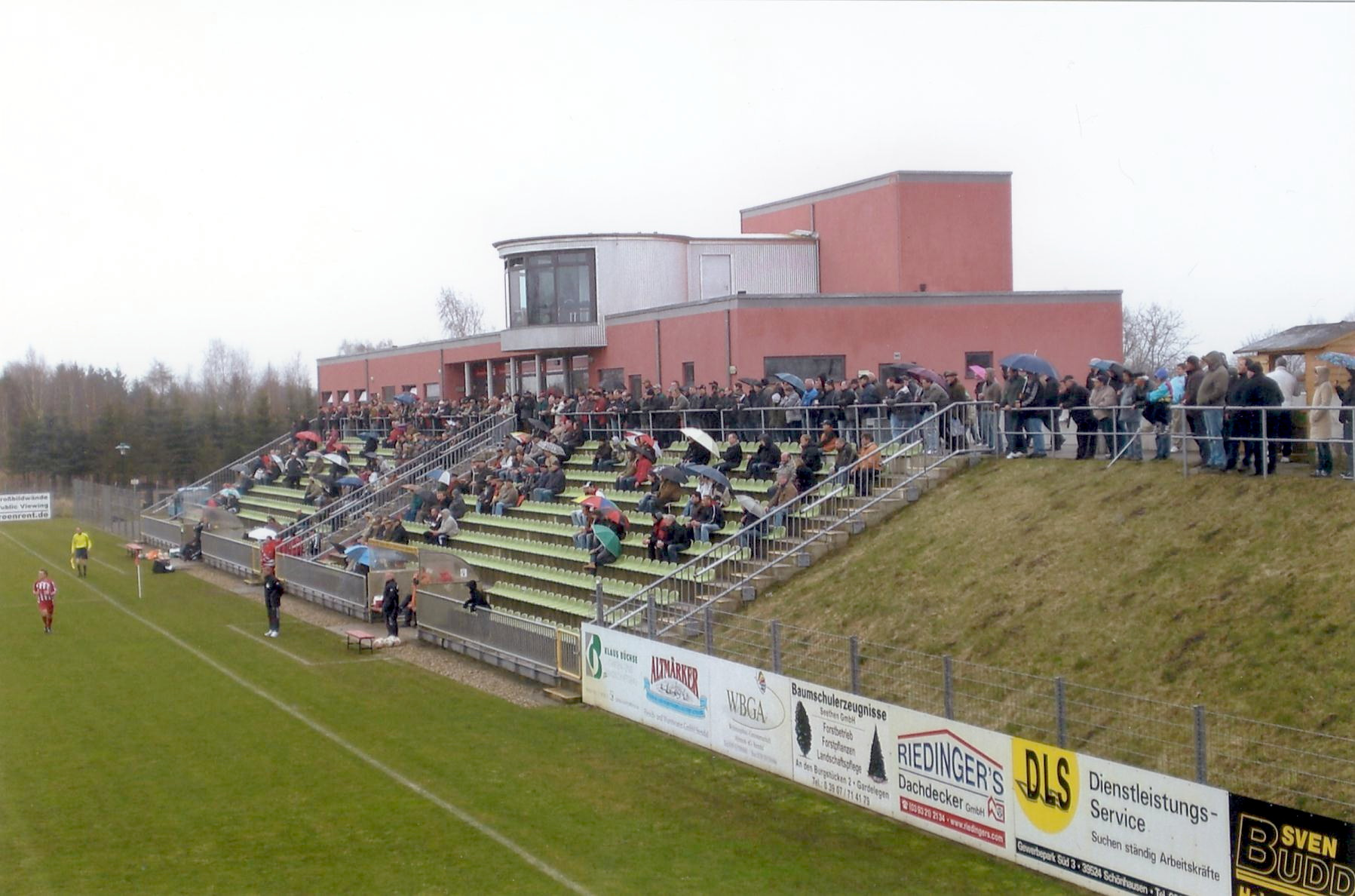 Punktspiel Lok Stendal gegen den SV Staßfurt am 15.03.2009